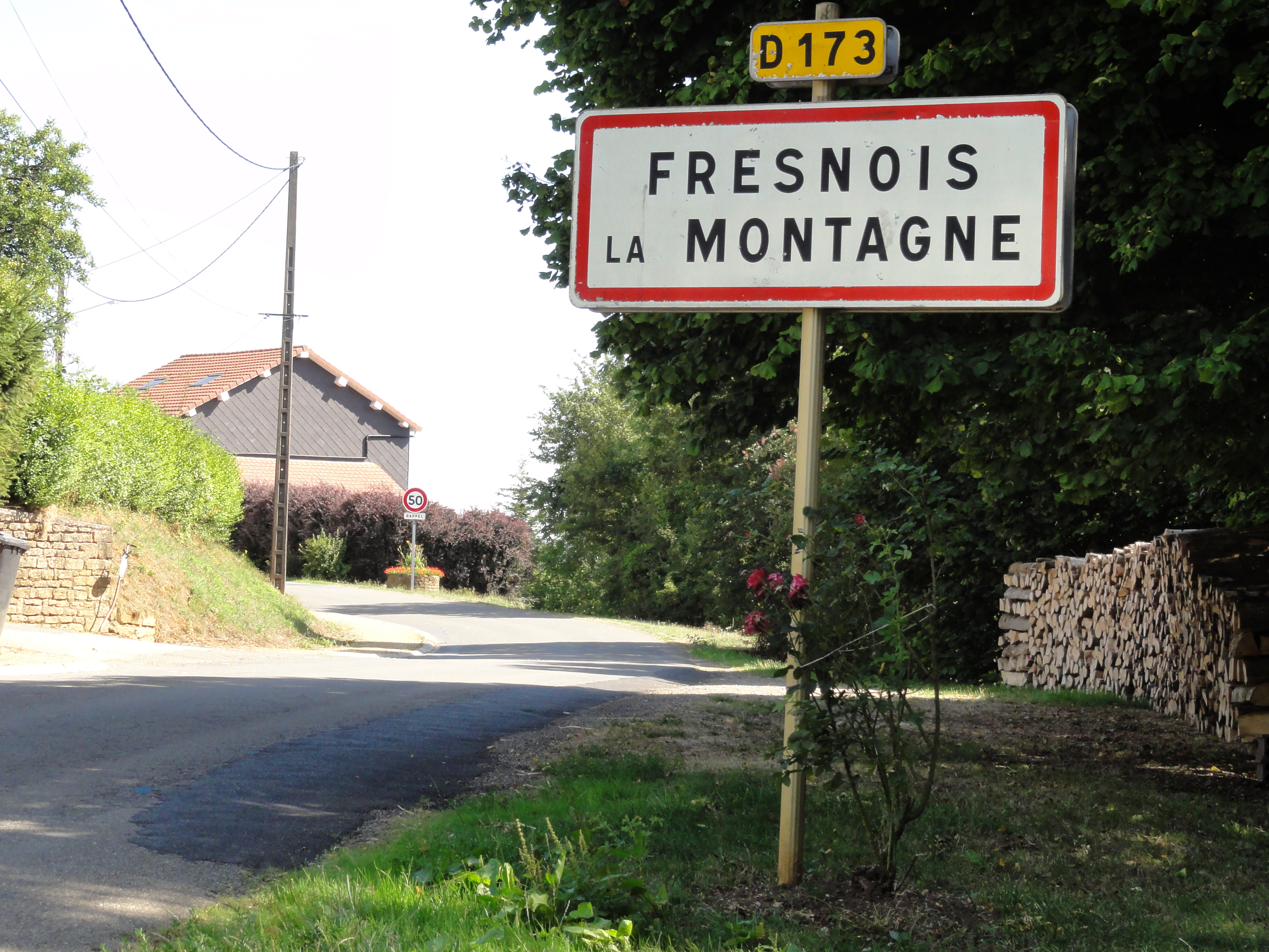 Fresnois-la-Montagne (Meurthe-et-M.) city limit sign